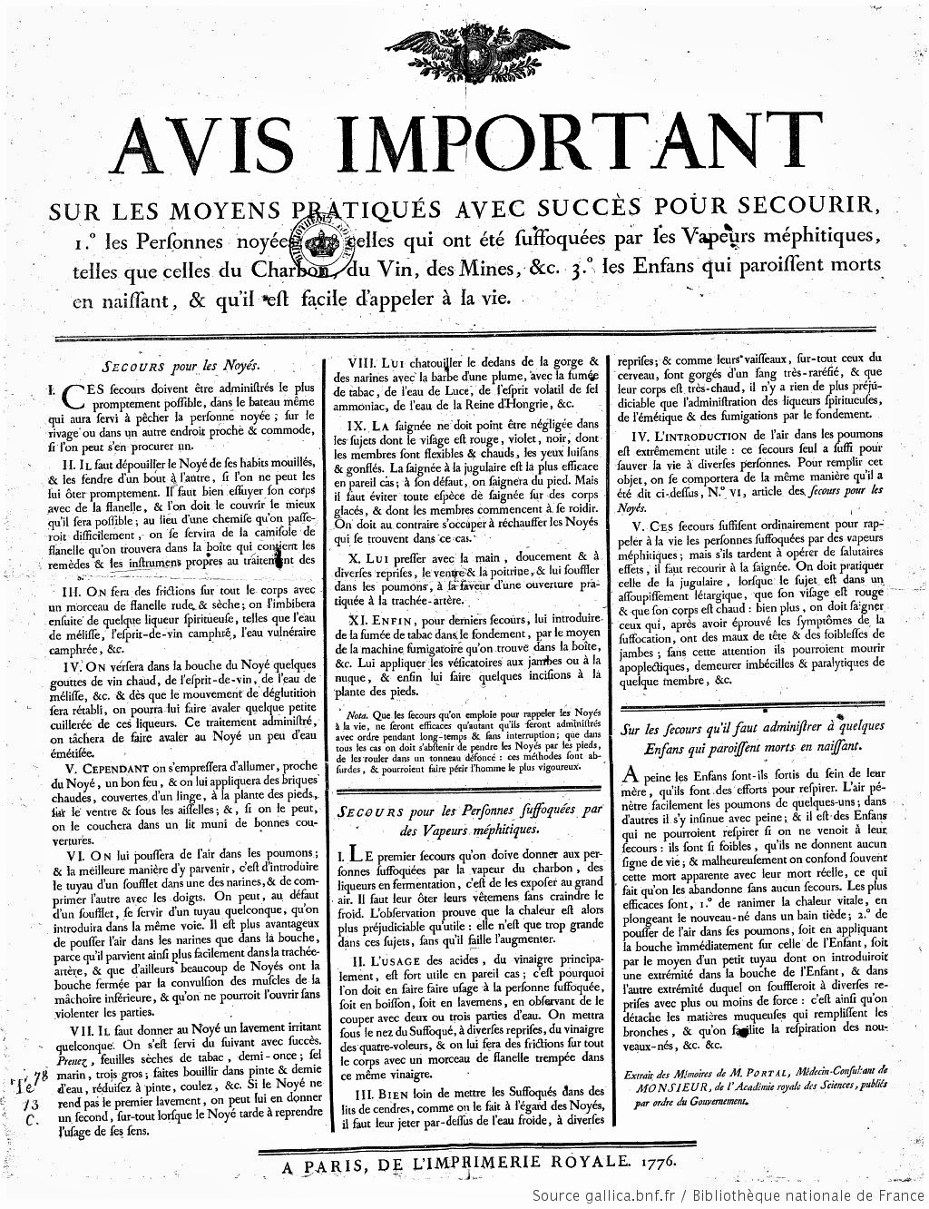 Avis important sur les moyens pratiqués avec succès pour secourir : 1° les personnes noyées ; 2° celles qui ont été suffoquées par des vapeurs méphitiques... 3° les enfans qui paroissent morts en naissant... Auteur : Portal, Antoine (1742-1832) Éditeur : Impr. royale (Paris) Date d'édition : 1776